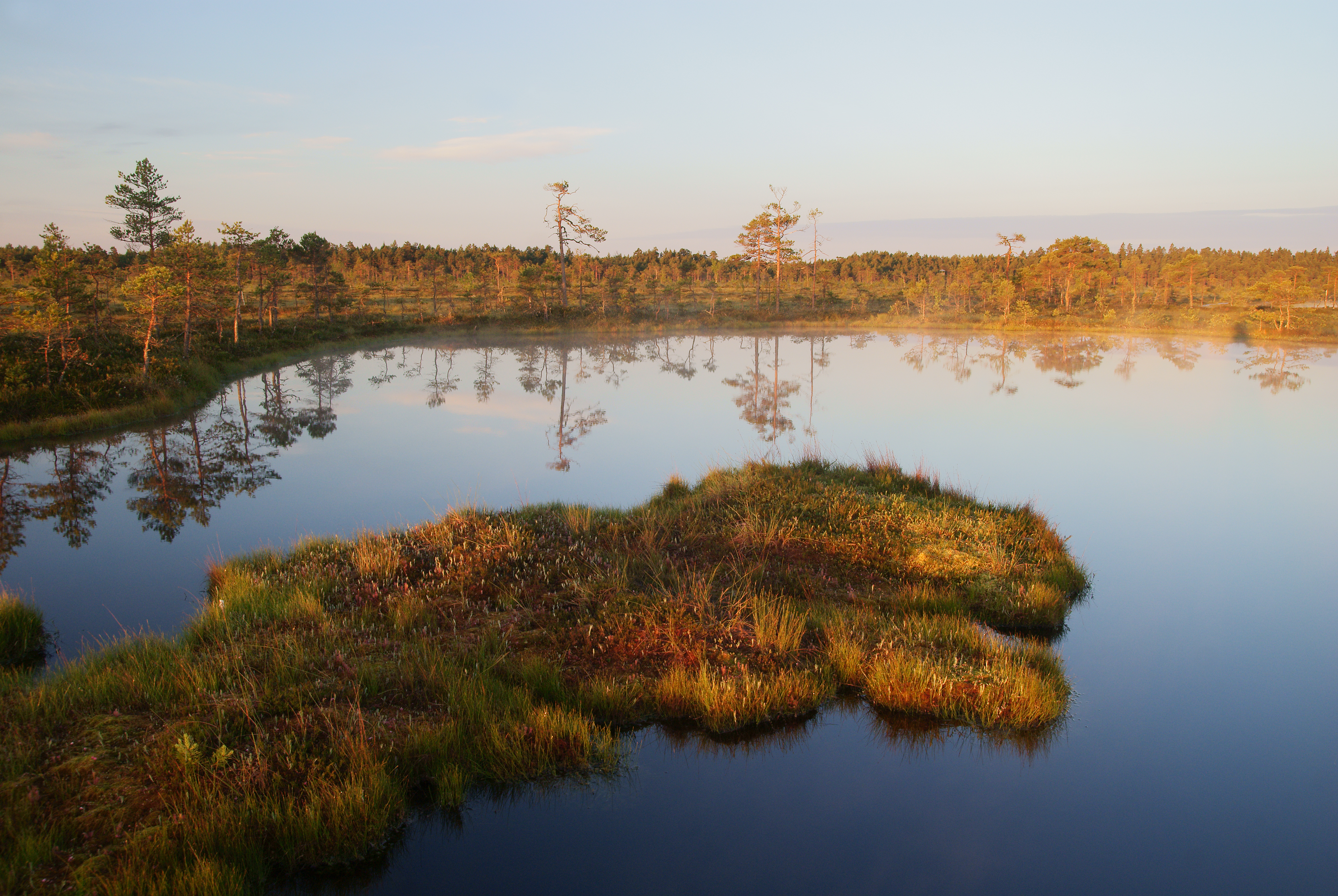 Viibisin 2012 aasta suvel üks öö Soomaa rahvuspargis Kuresoos. Läksin sinna Ingatsi matkaraja kaudu. Pildistatud on Kuresood hommikul päikesetõusuga.